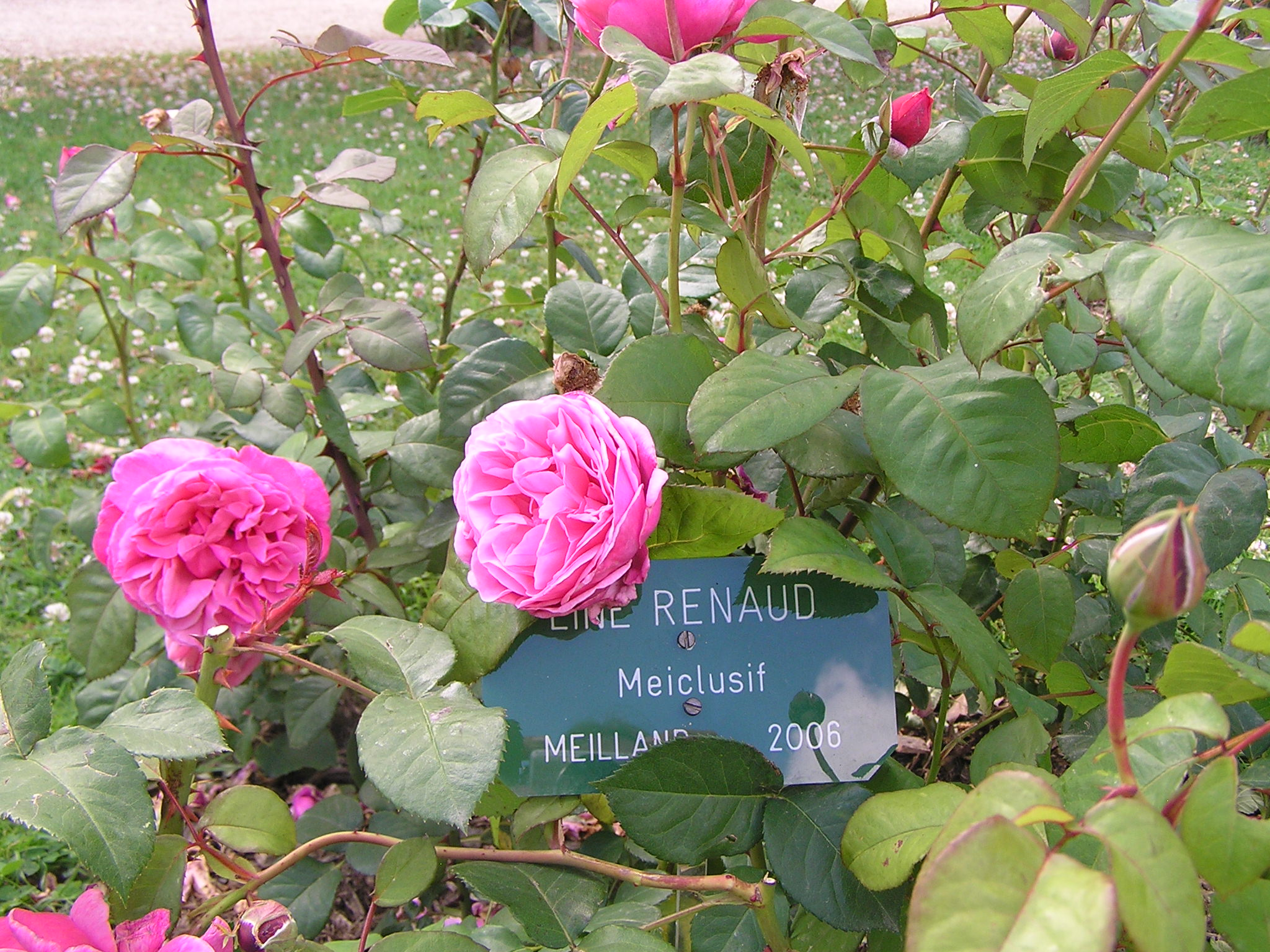 rosier Line Renaud au parc du Tahor de Rennes